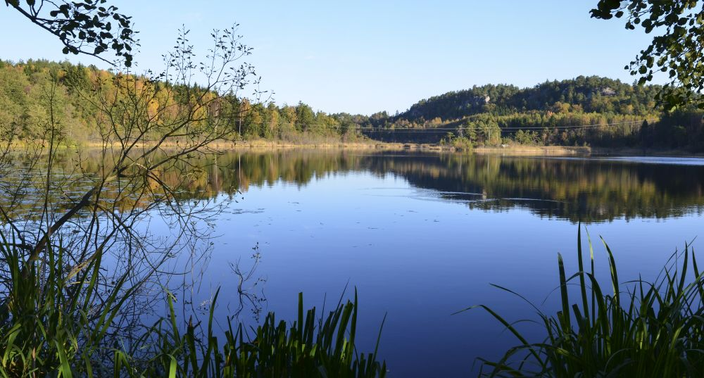 Refsholttjønna er «bensinstasjon» for ender på høsttrekk.